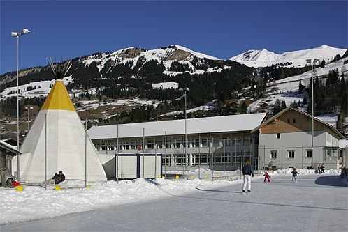 Schulhaus in Lenk mit Eisbahn / resp. Tennisplatz